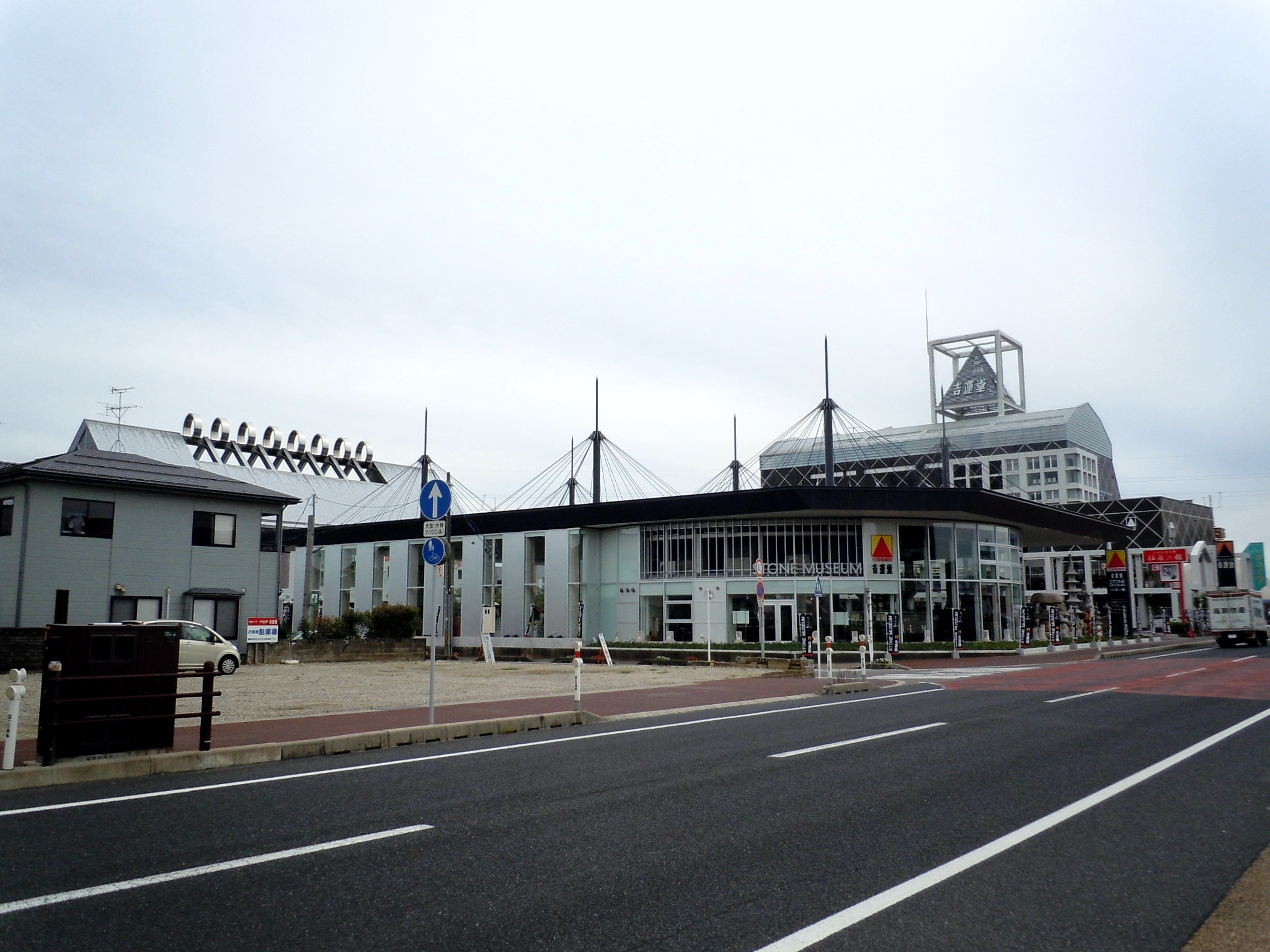 吉運堂本社